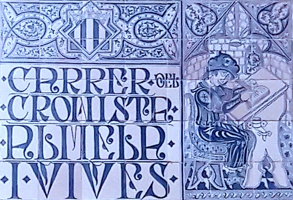 Panell decorat de taulells ceràmics, al carrer Cronista Almela i Vives, de València.